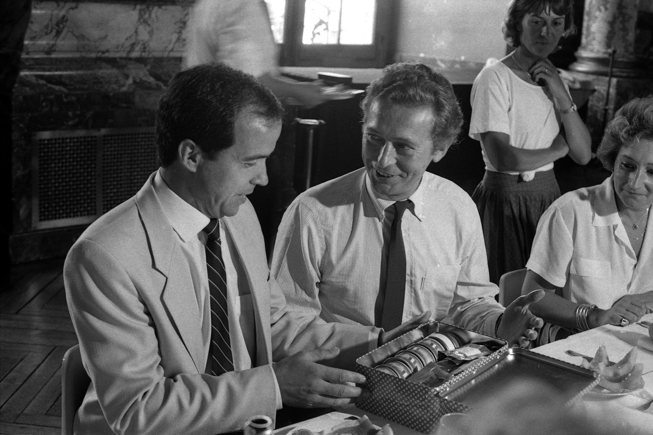 Salle du Capitole. Le 12 Juin 1985. Vue de Dominique Baudis et de Patrick Baudry lors d'un repas au Capitole.